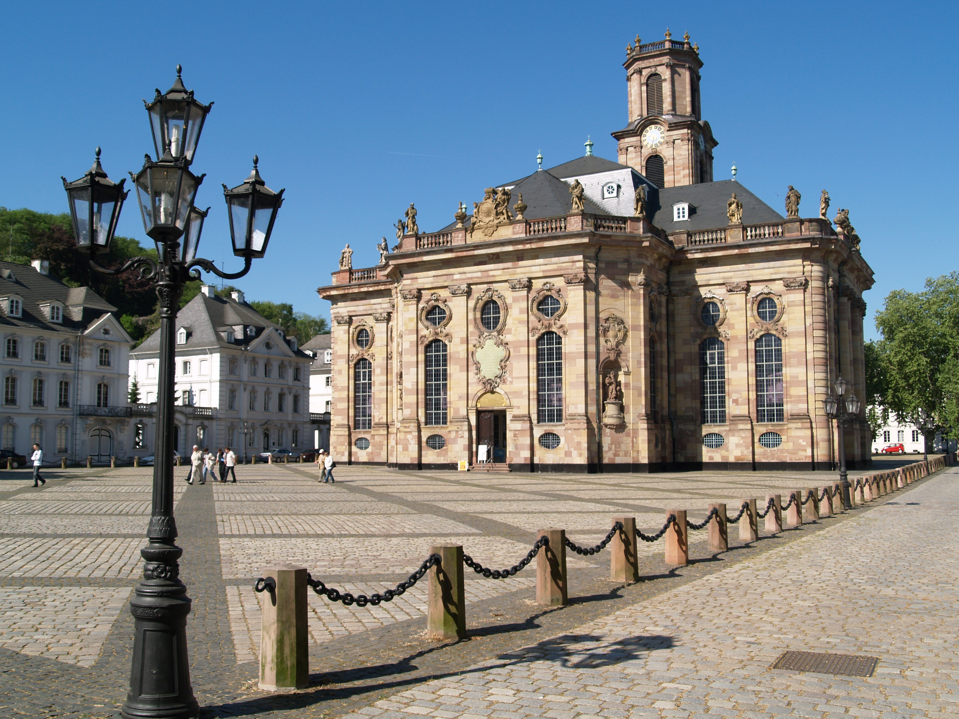 Ludwigskirche in Saarbrücken, Ludwigsplatz